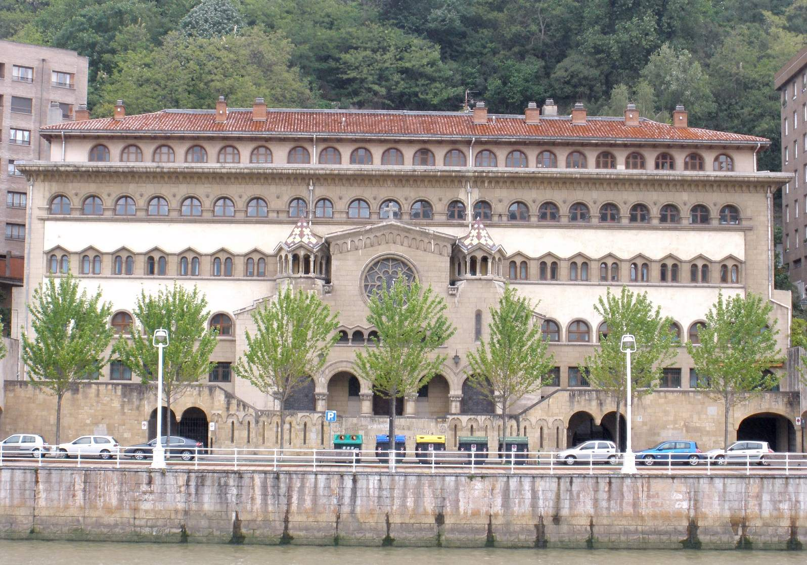 Residencia Fundadora de las Siervas de Jesús de la Caridad (Bilbao)